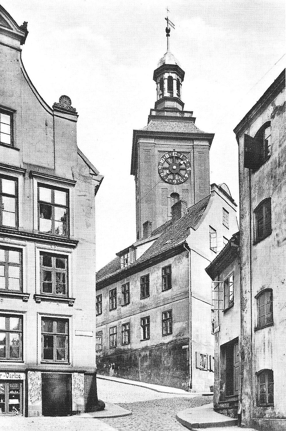 Löbenichtschen Kirche in Königsberg